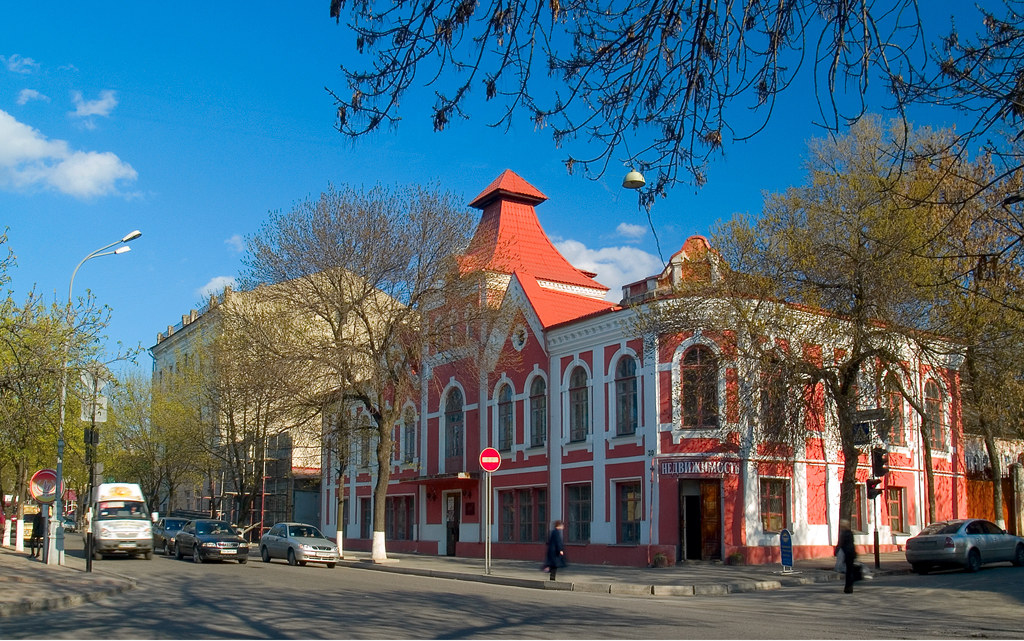 Музей истории Луганска.19 апреля 2006